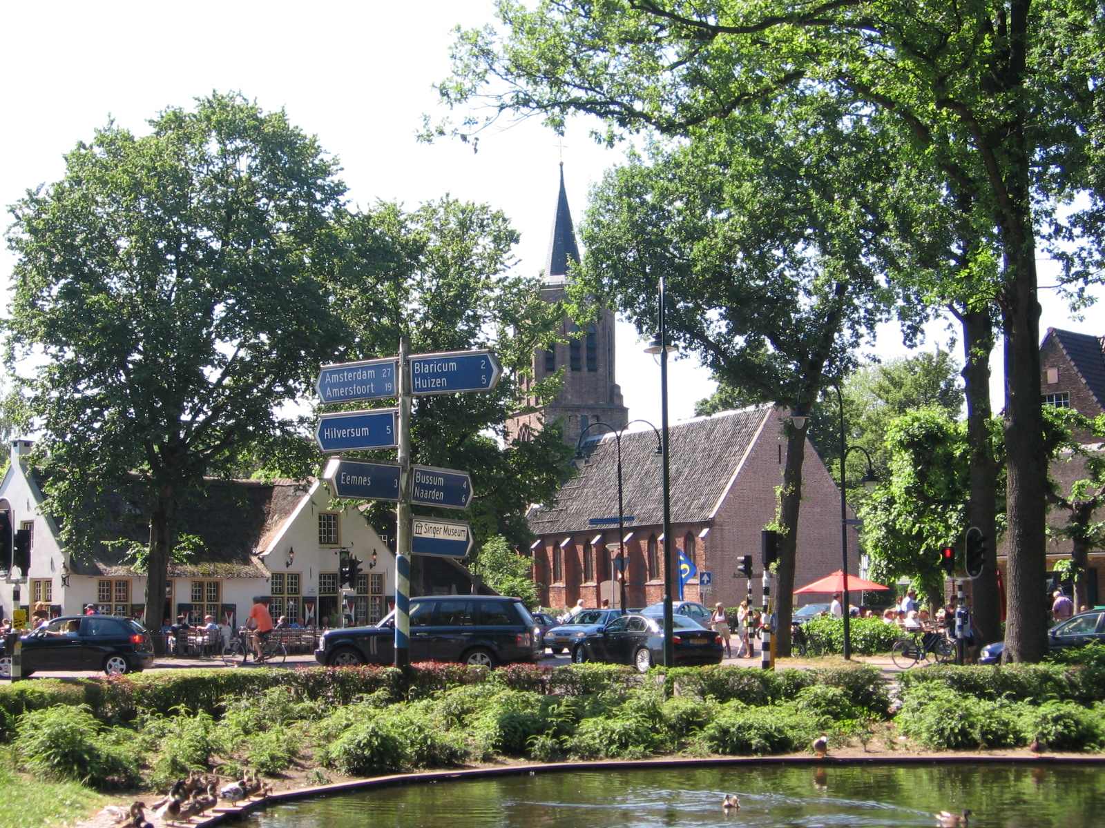 Brink, Laren, juni 2006